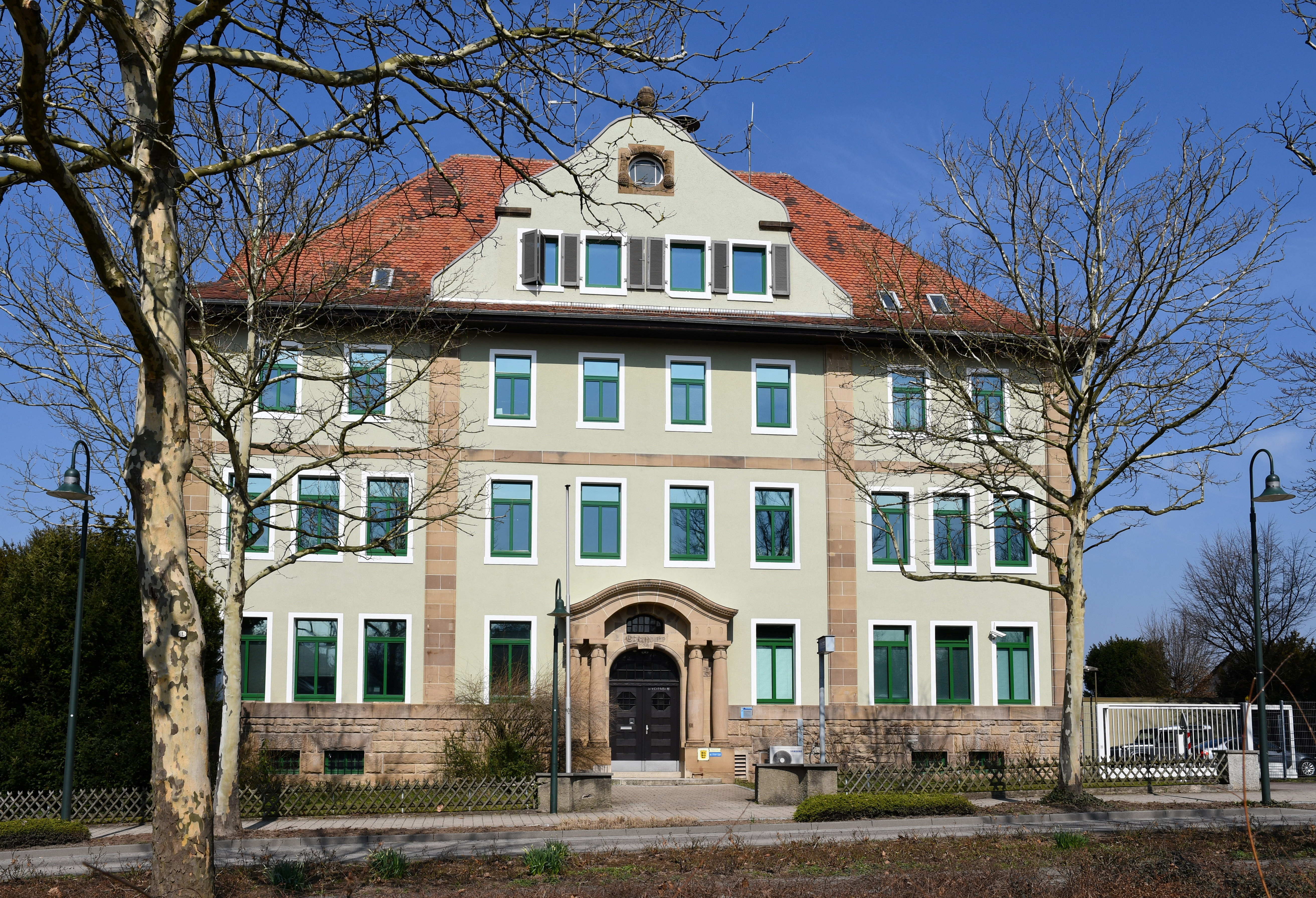 Polizeidienststelle in Weinsberg in der Haller Str. 17, ehemals Oberschule.